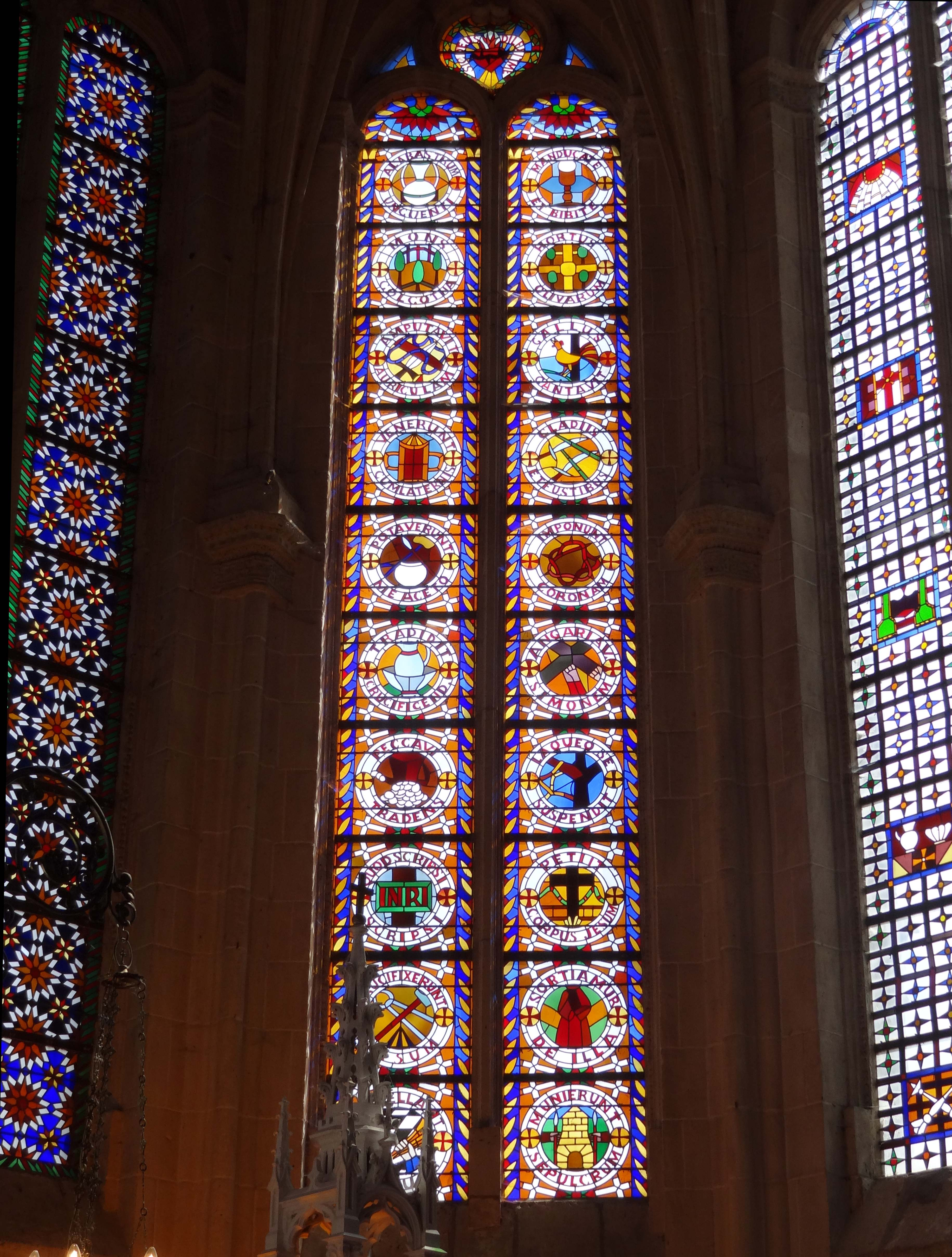 Vitraux de l'abbé Deligny - voir titre.